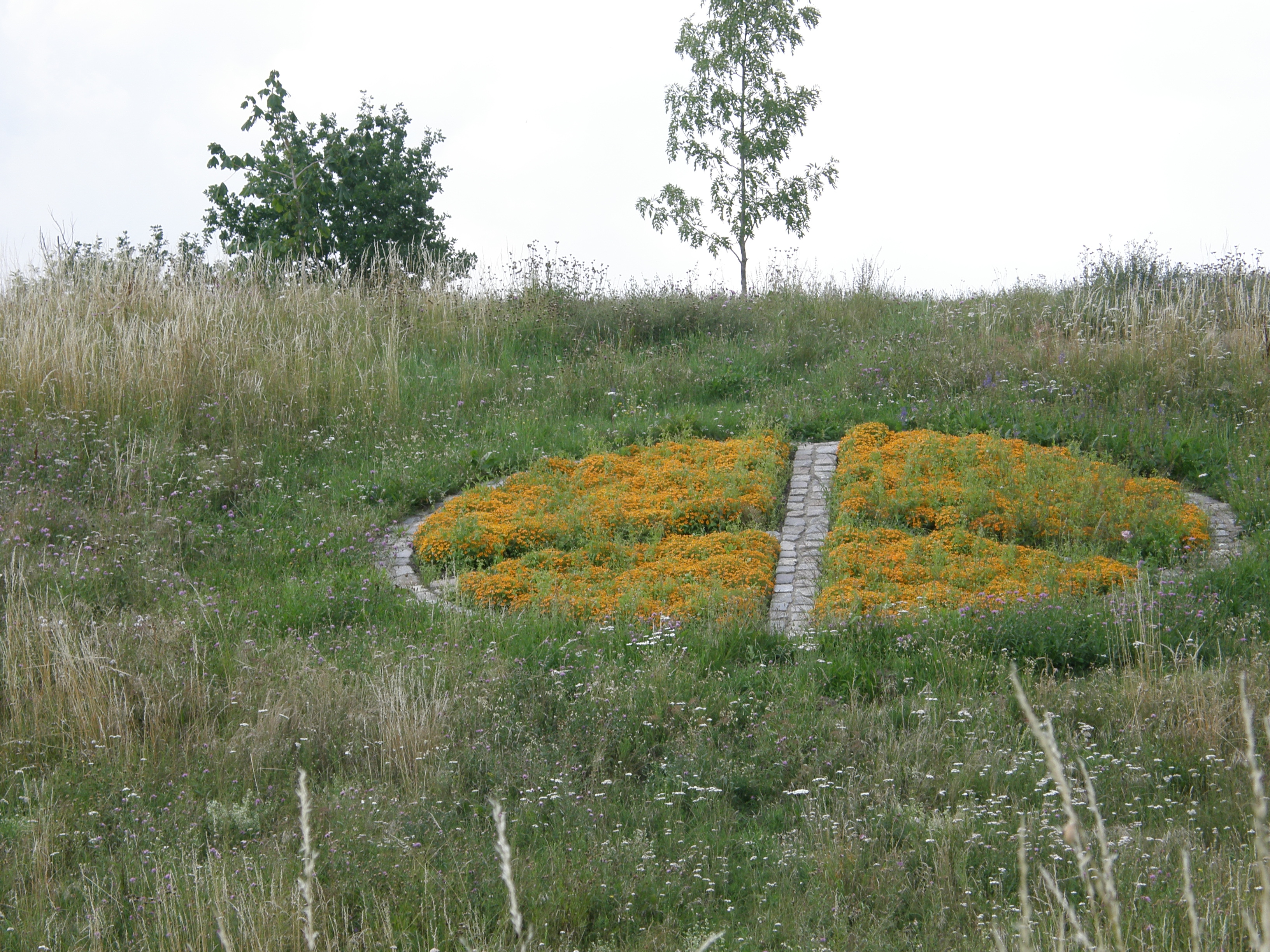 Berlin-Hellersdorf, Jelena-Santic-Friedenspark